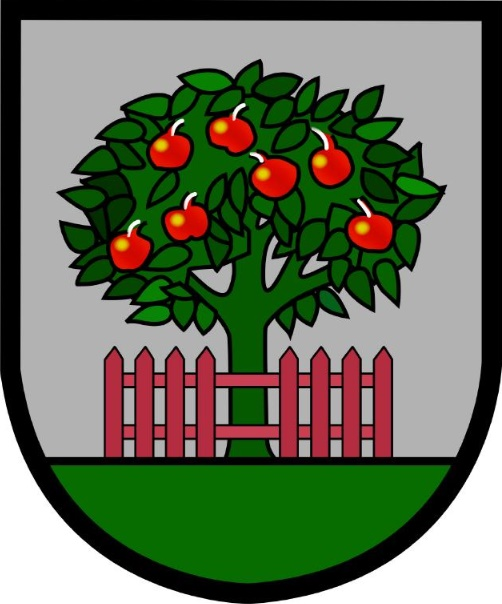 Der Apfelbaum wurde gewählt, weil ein „Laubbaum im Garten“ eine Kulturpflanze, einen Obstbaum, nahelegt. Laut Obstbaumzählung 1938 gab es in Baumgarten 7.227 Obstbäume, darunter 1.214 Apfelbäume. Die sieben rot-goldenen Äpfel am Baum sollen die Fruchtbarkeit des Bodens von Baumgarten symbolisieren. Der Zaun steht wie der Apfelbaum am Schildfuß und hat links und rechts des Baumstammes je vier oben zugespitzte Latten. Diese Spitzen sollen die ehemalige Wehrhaftigkeit des Ortes darstellen. Die mittelalterliche Burg Baumgarten (urk. 1289, 1342, 1392, 1412, 1446, 1446, 1475) befand sich bei der Pfarrkirche im heutigen Ortsteil „Šapac“ - d. h. „Festung“, „Burg“ (vgl. M. Meršic, Baumgarten im Burgenland. Baumgarten 1963, S. 11 ff). Farben Von den überlieferten Gemeindesiegeln lassen sich keine Farben ableiten. Aus naheliegenden Gründen wurde für Apfelbaum und Schildfuß die Farbe „Grün“ gewählt. Der silberne Grund und die Farbe „Rot“ für den Zaun wurden dem Wappen eines der bedeutendsten Grundherrn von Baumgarten, Ulrich von Grafeneck, das eine silberne Raute auf rotem Grund zeigt (vgl. Allg. Landestopographie, a. a. O. Tafel 190), entnommen. Ulrich von Grafeneck baute im 15. Jahrhundert die Burg Baumgarten aus und stiftete 1475 das Paulinerkloster (später Einsiedelei, eines der bekanntesten Sakralbauwerke des Bezirkes Mattersburg, Wahrzeichen des Ortes Baumgarten, Wallfahrt am 14. September). Grafeneck dürfte 1476 sogar kurzfristig sein Münzrecht in Baumgarten ausgeübt haben (vgl. A. Pohl, Die Grenzlandprägung. Graz 1972, S. 123). Die rot-goldenen Äpfel am Baum entsprechen den Landesfarben des Burgenlandes.